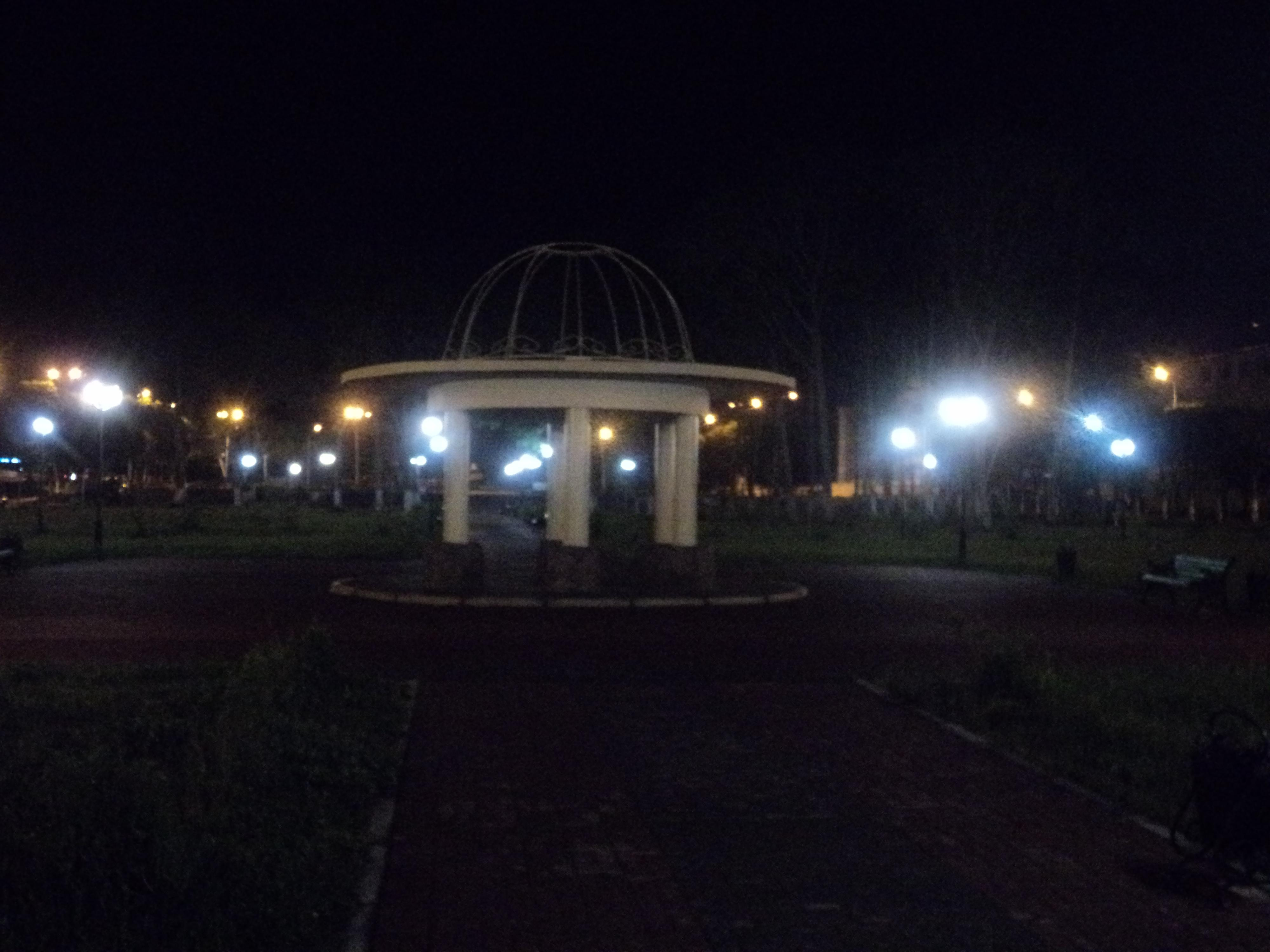 Вилючинск ночной сквер после реконструкции